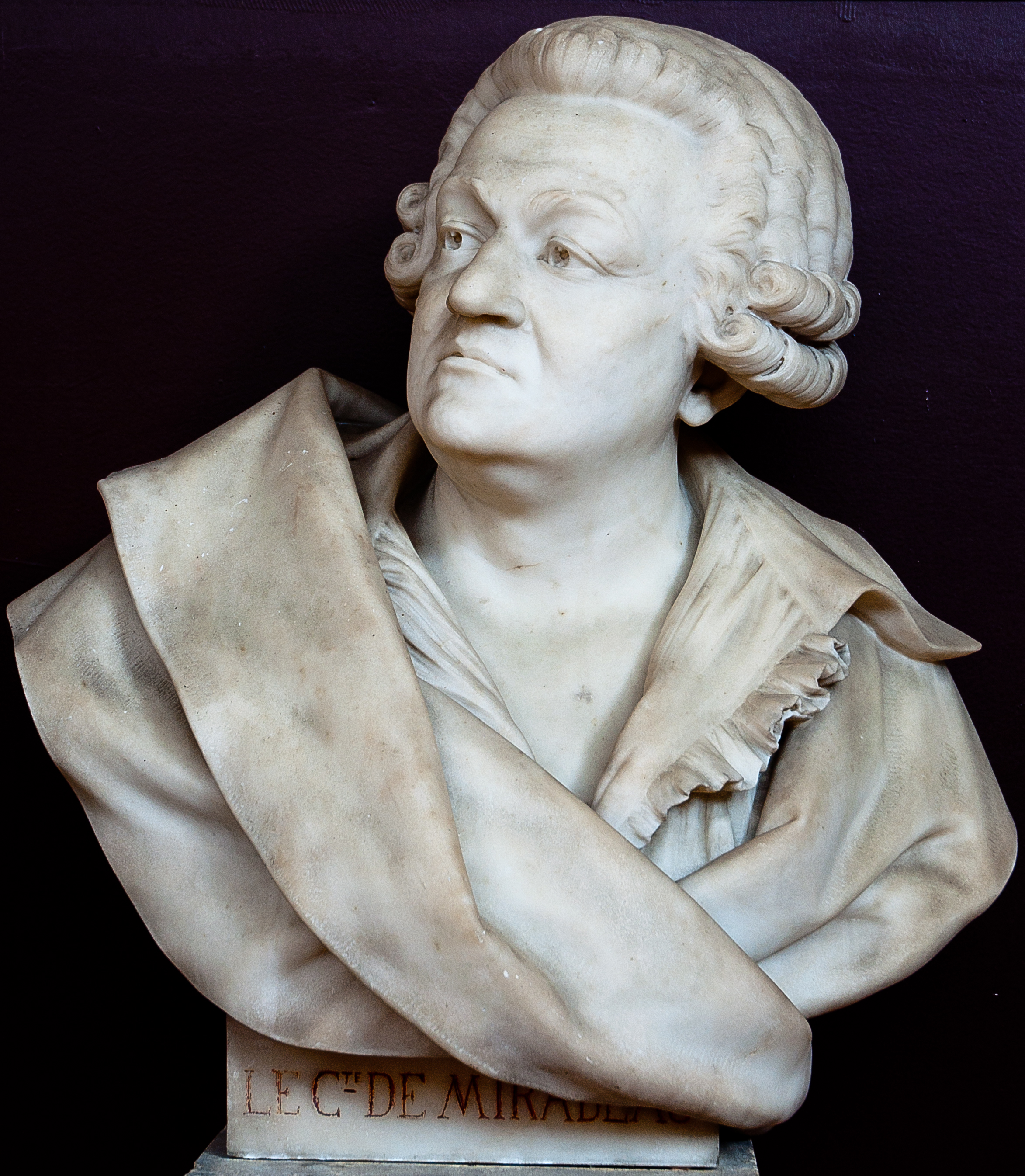 Henri-Frédéric Iselin (1825-1905), Honoré Gabriel Riqueti de Mirabeau, buste en marbre, Versailles, salle du Jeu de paume.